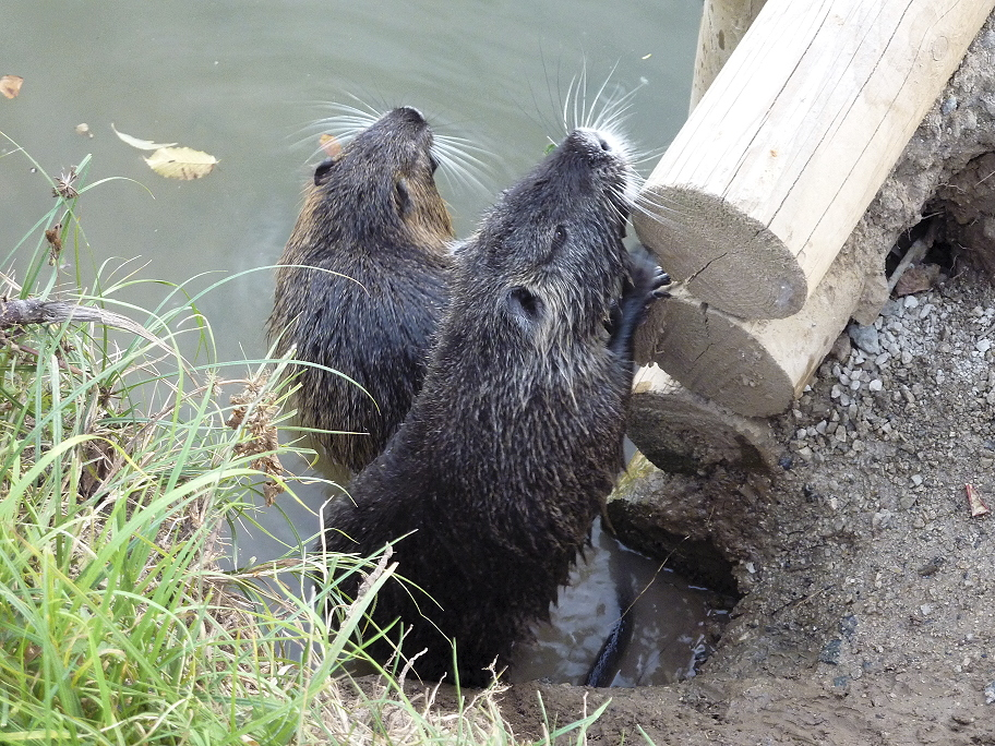 Nutrias (Myocastor coypus, dt. auch Biberratte) am Ufer eines linken Altarms des Flusses Nidda im Stadtgebiet von Frankfurt am Main (Niedwald, Stadtteil Frankfurt-Nied). Die abgebildeten Tiere sind halbzahm und lassen sich aus der Hand füttern